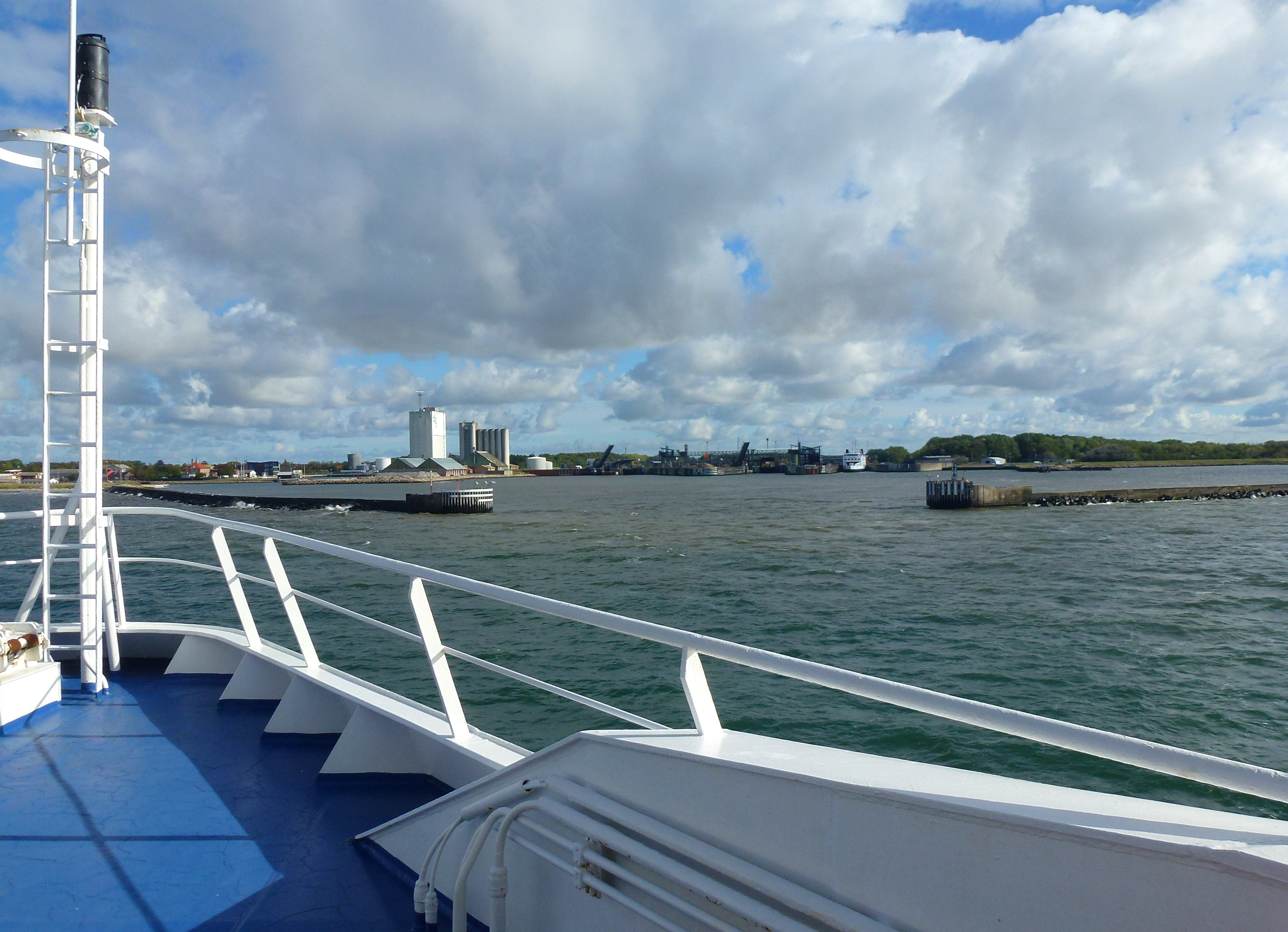 Bil- och tågfärjan Schleswig-Holstein vid Rødby